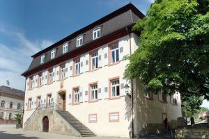 Forstamt in Müllheim. Das barocke Gebäude in der Müllheimer Wilhelmstraße wurde von 1727 bis 1729 als Amtssitz der Vogtei Badenweiler erbaut.